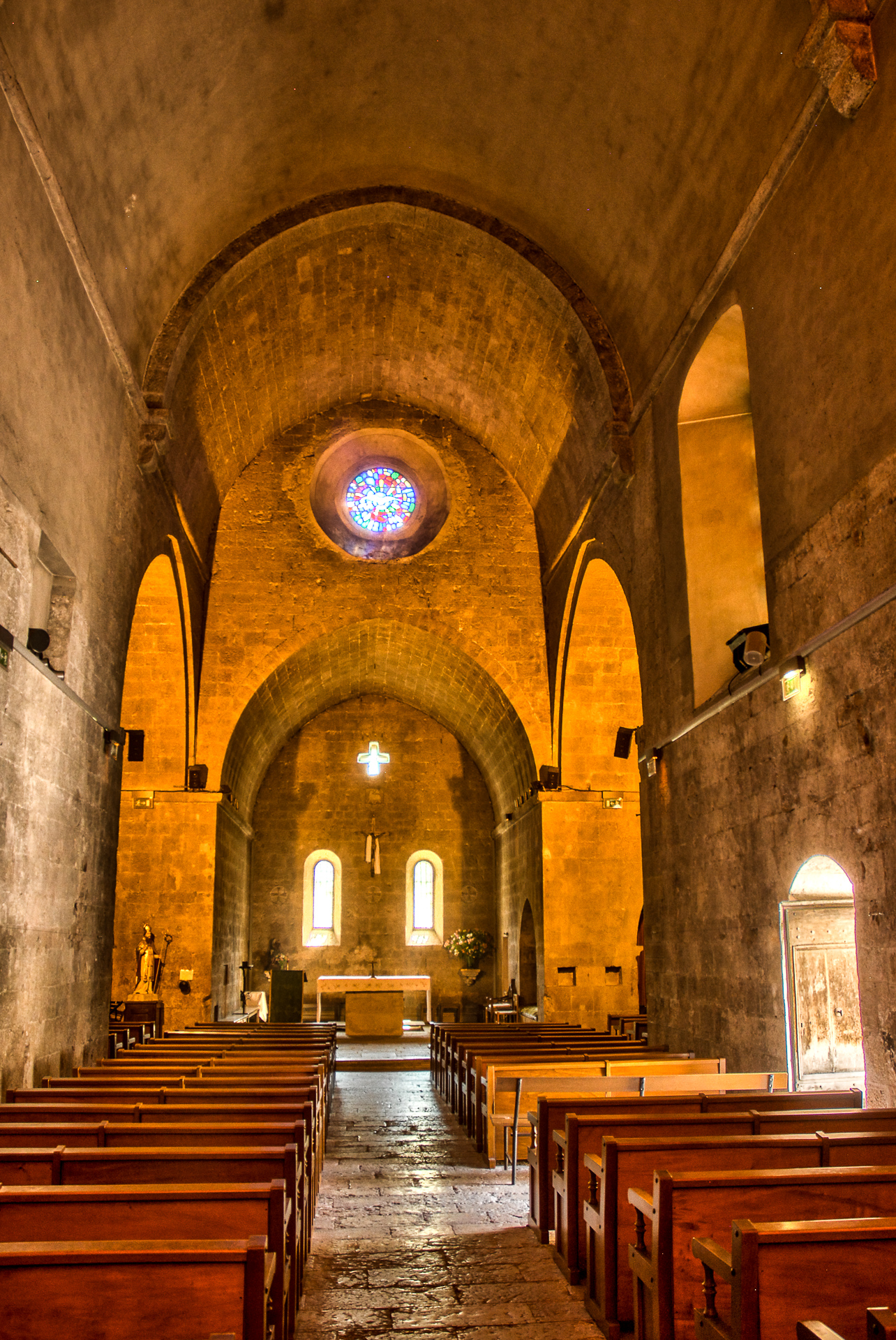 Nef continue du Prieuré .